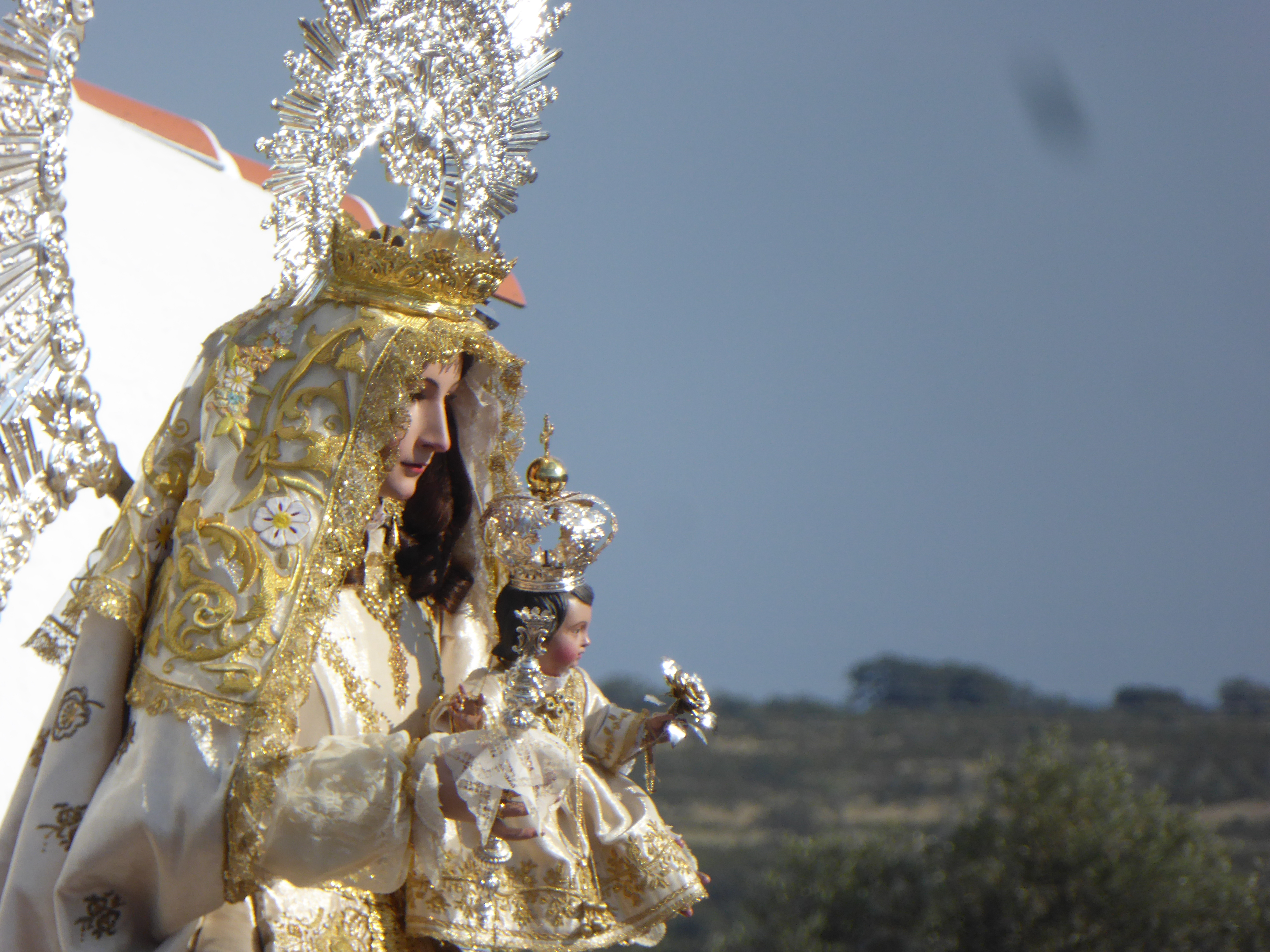 Imagen de Nuestra Señora de Piedras Albas, El Almendro, Huelva, España, romería 2019